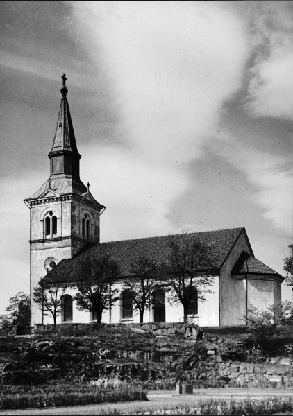 Kyrkan från sydöst.